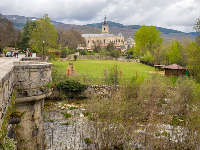 Monasterio de Santa María del Paular y Puente del perdón sobre el río Lozoya.